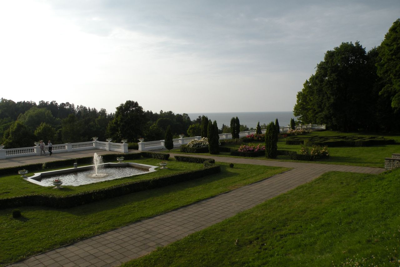 Toila-Oru lossipark